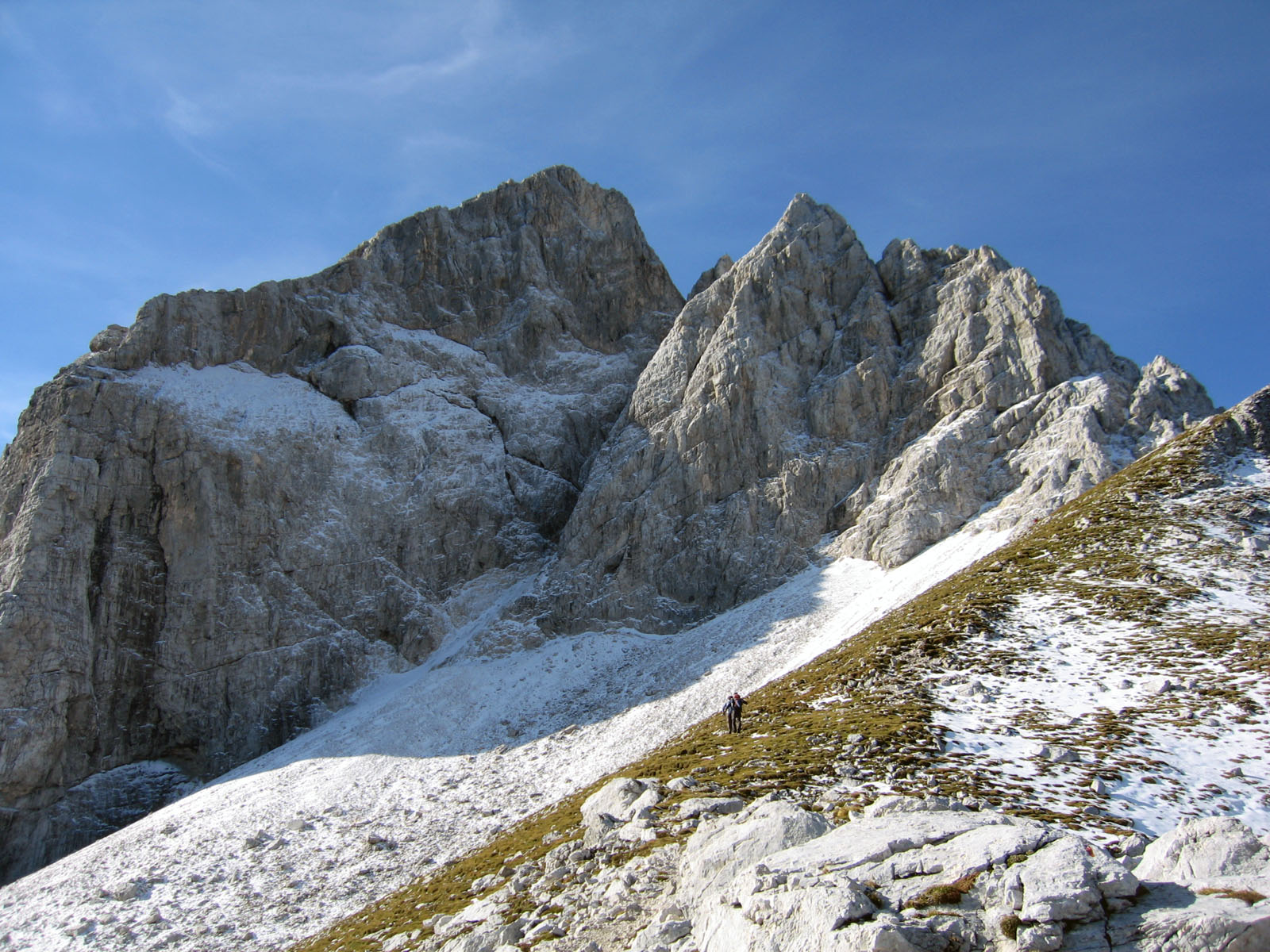 Mt. Jalovec (2645 m) from Kotovo sedlo (2134 m)